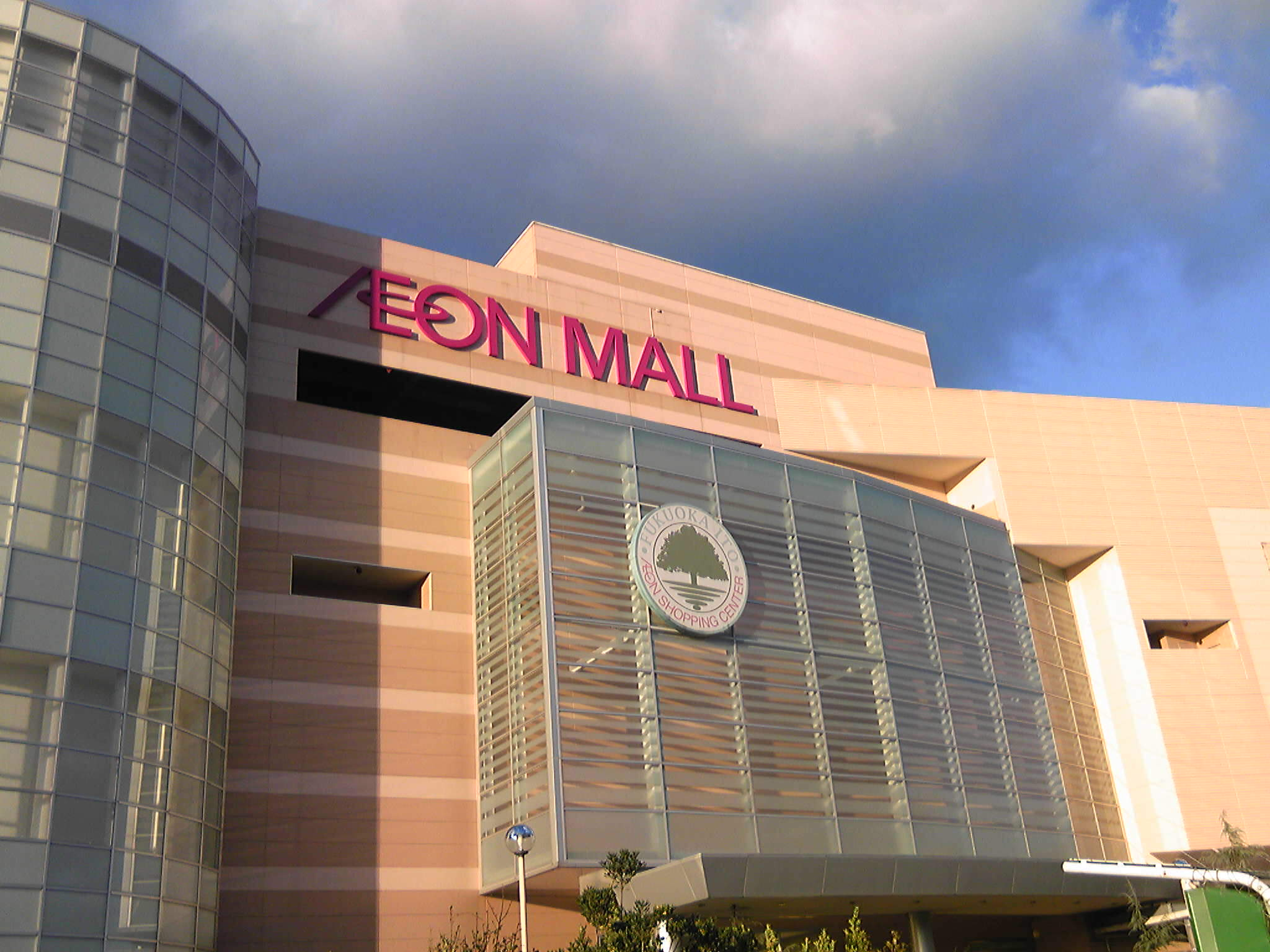 イオンモール福岡伊都（福岡市西区）